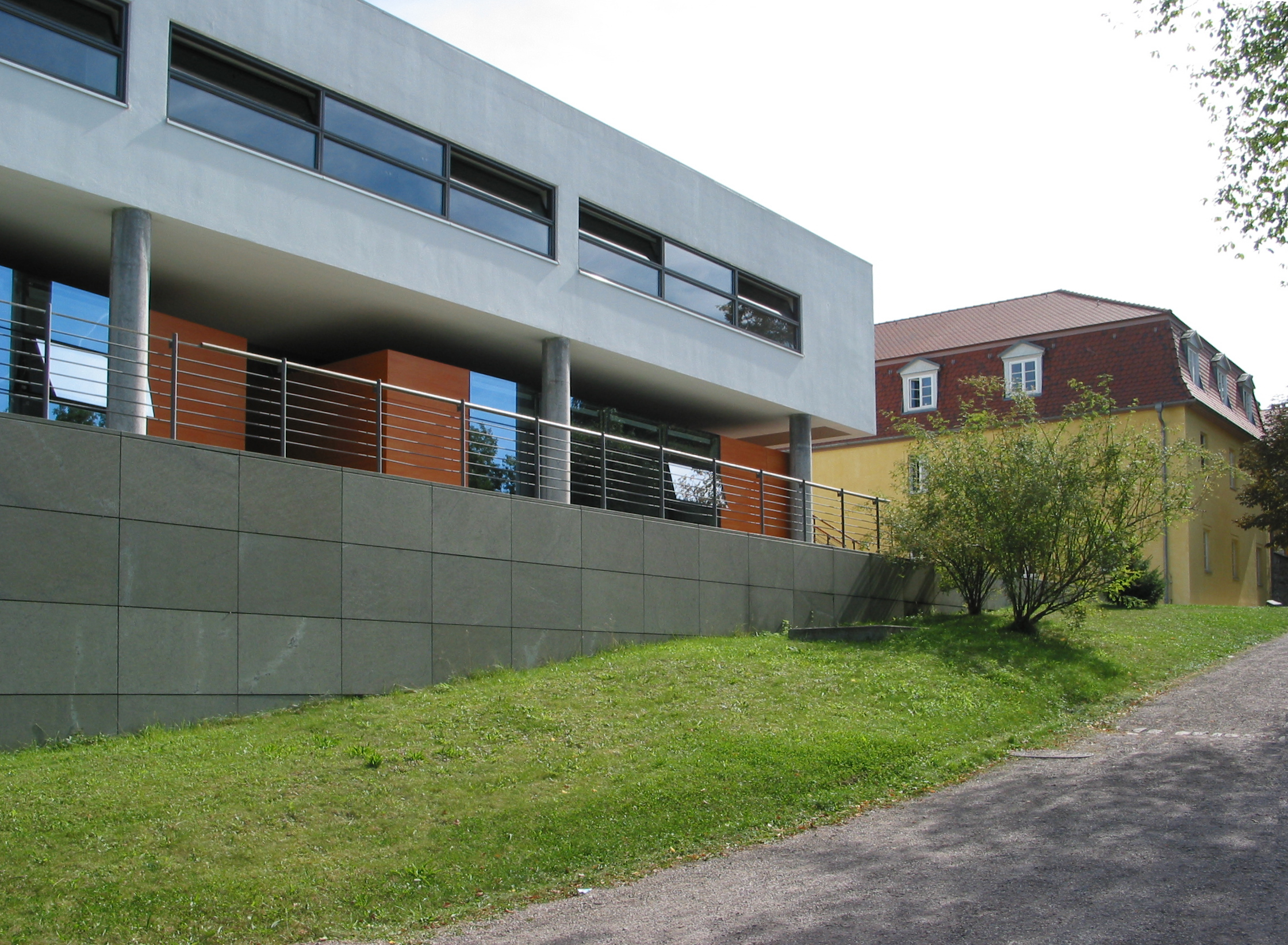 Westansicht des "Musikgymnasiums Schloss Belvedere" auf der "Eichenleite" im Süden der Stadt Weimar.